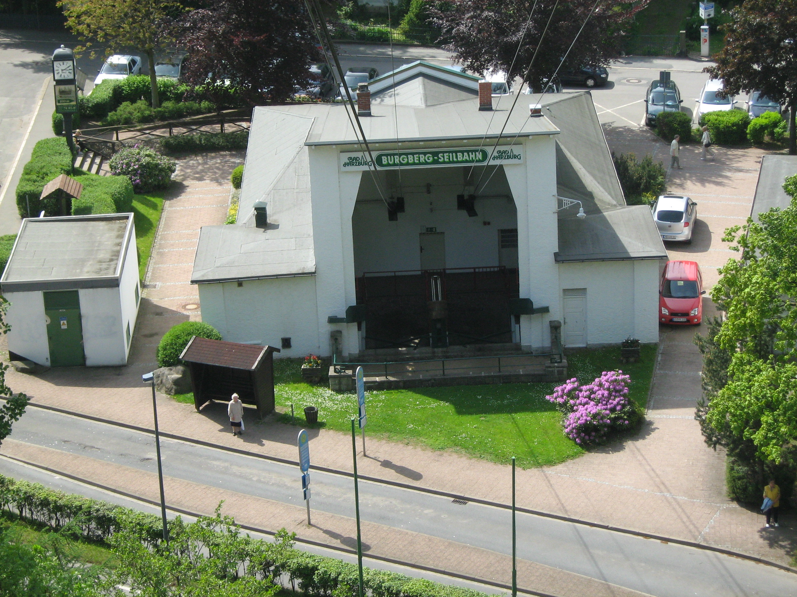 Burgberg Svævebanes dalstation set fra svævebanekabine, maj 2009.